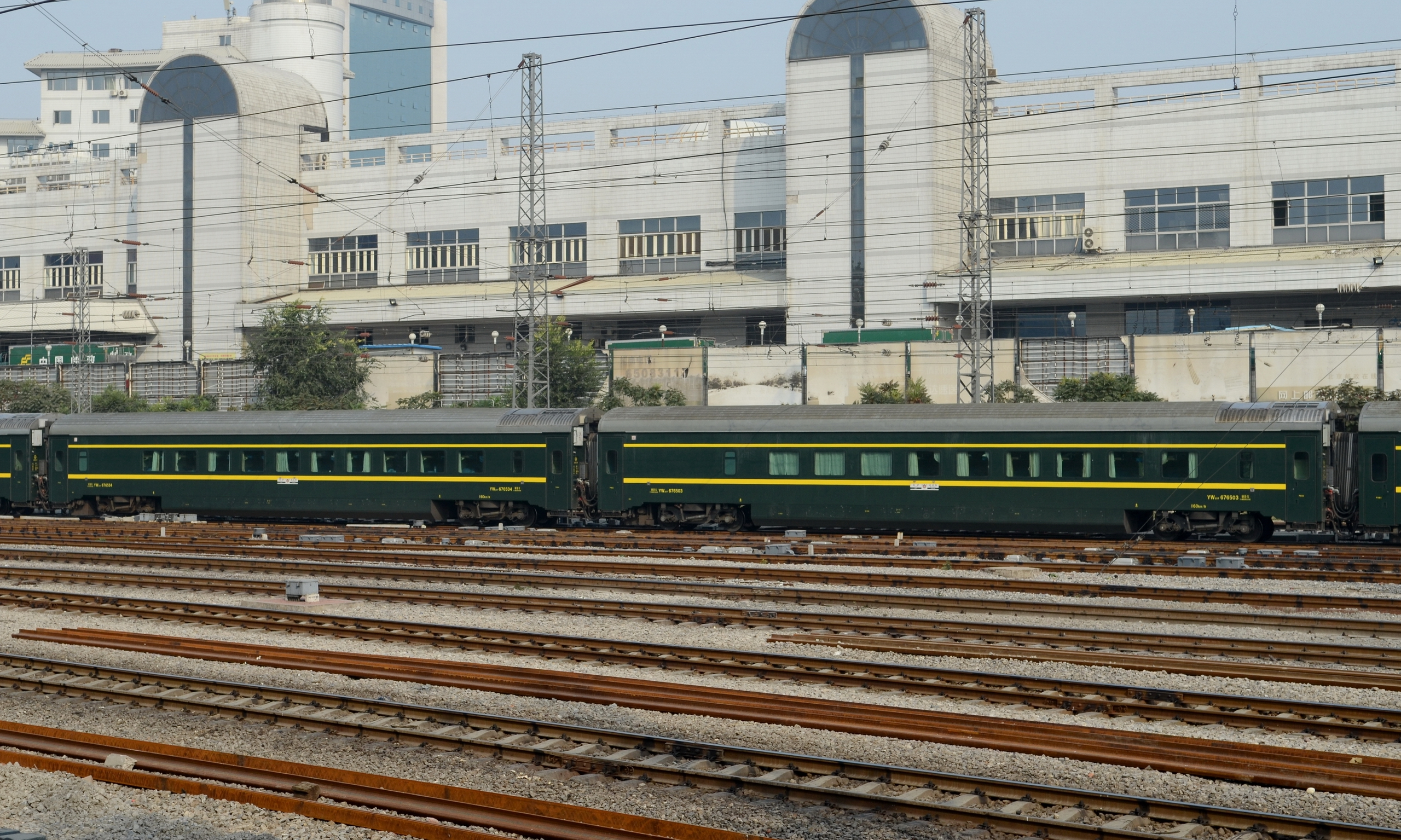 拉萨至北京西列车编组中的25T高原型客车